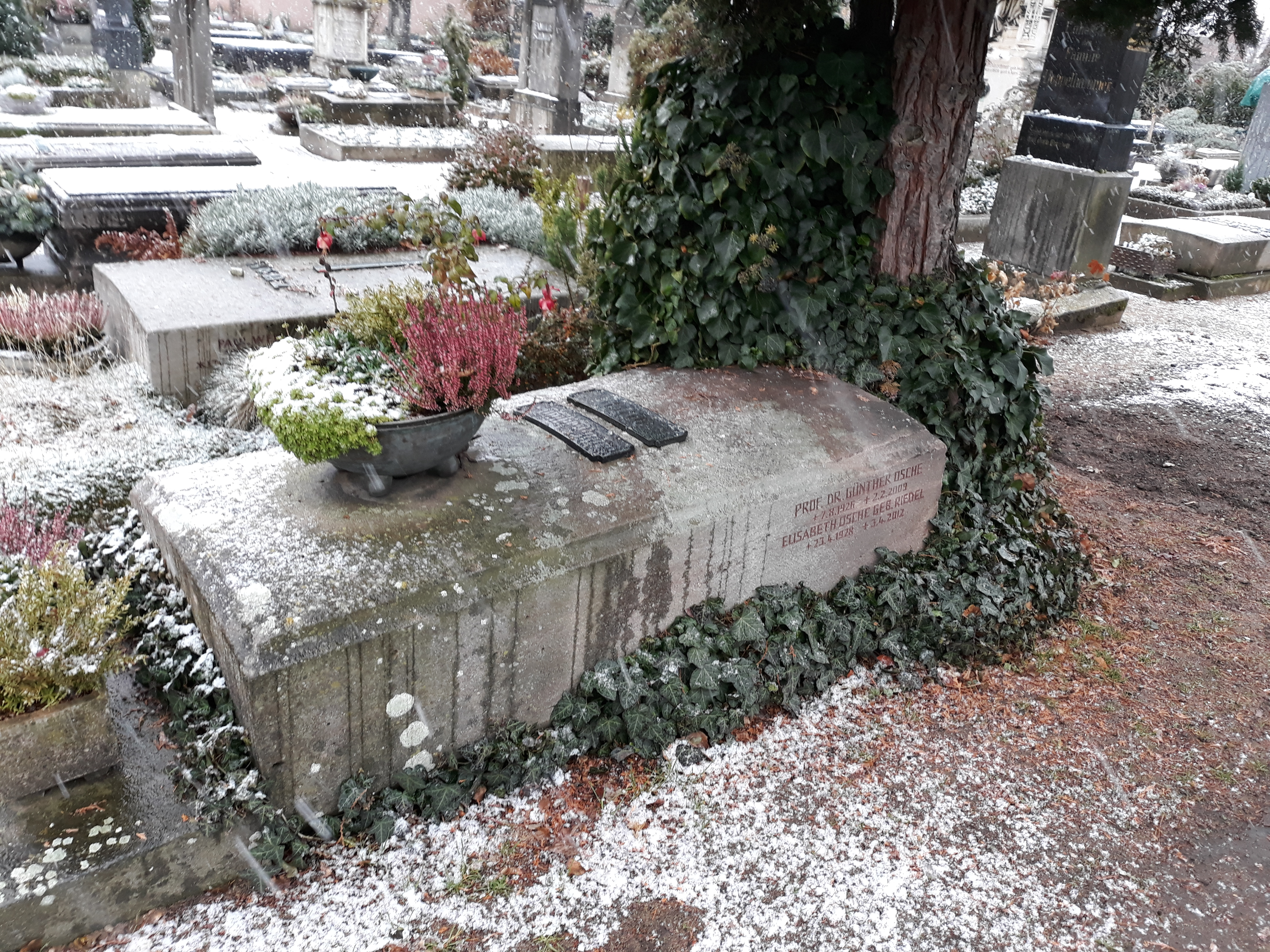 Das Grab des deutschen Biologen und Zoologen Günther Osche auf dem Johannisfriedhof Nürnberg.